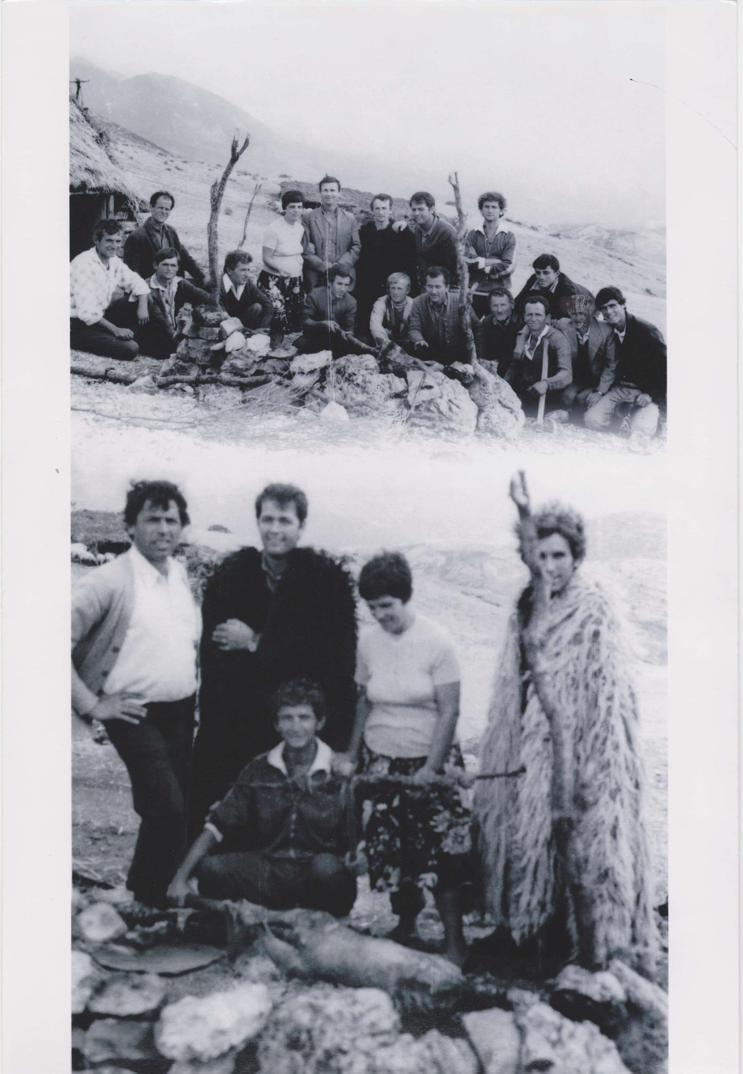 foto Liri Brahimi